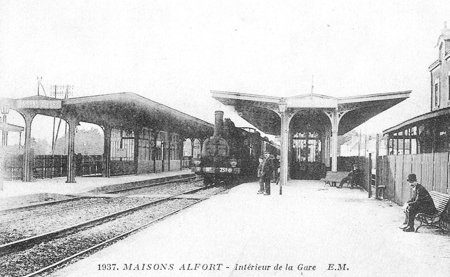 Gare de Maisons-Alfort - Alfortville (val-de-Marne, France), au début du XX° siècle.